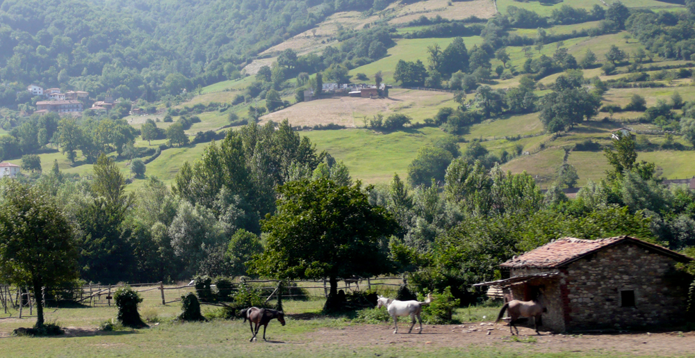 Ganado caballar en Asturias